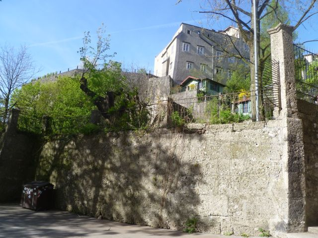 ehem. Nonntaler Tor